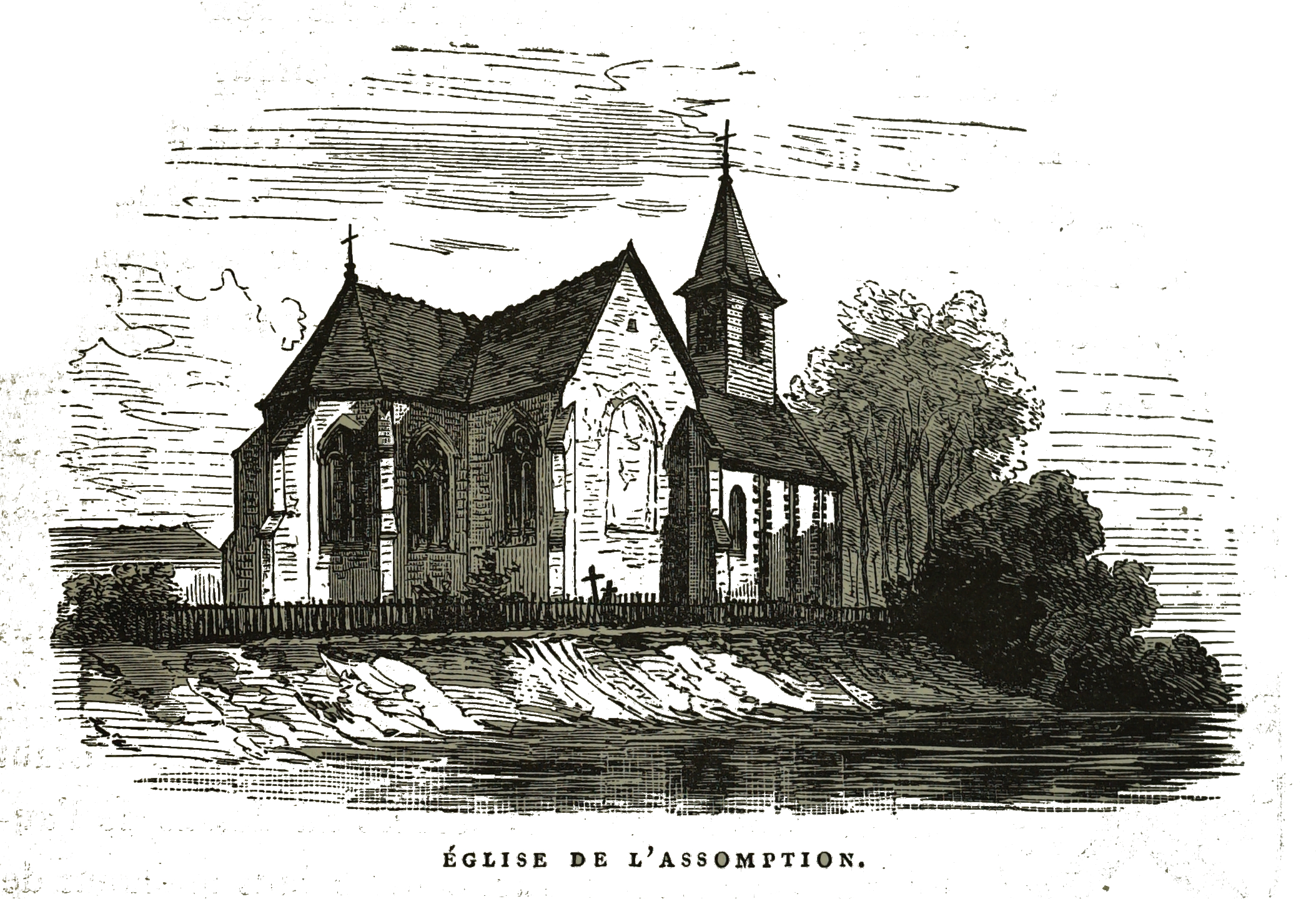 par un dessin de Fichot.